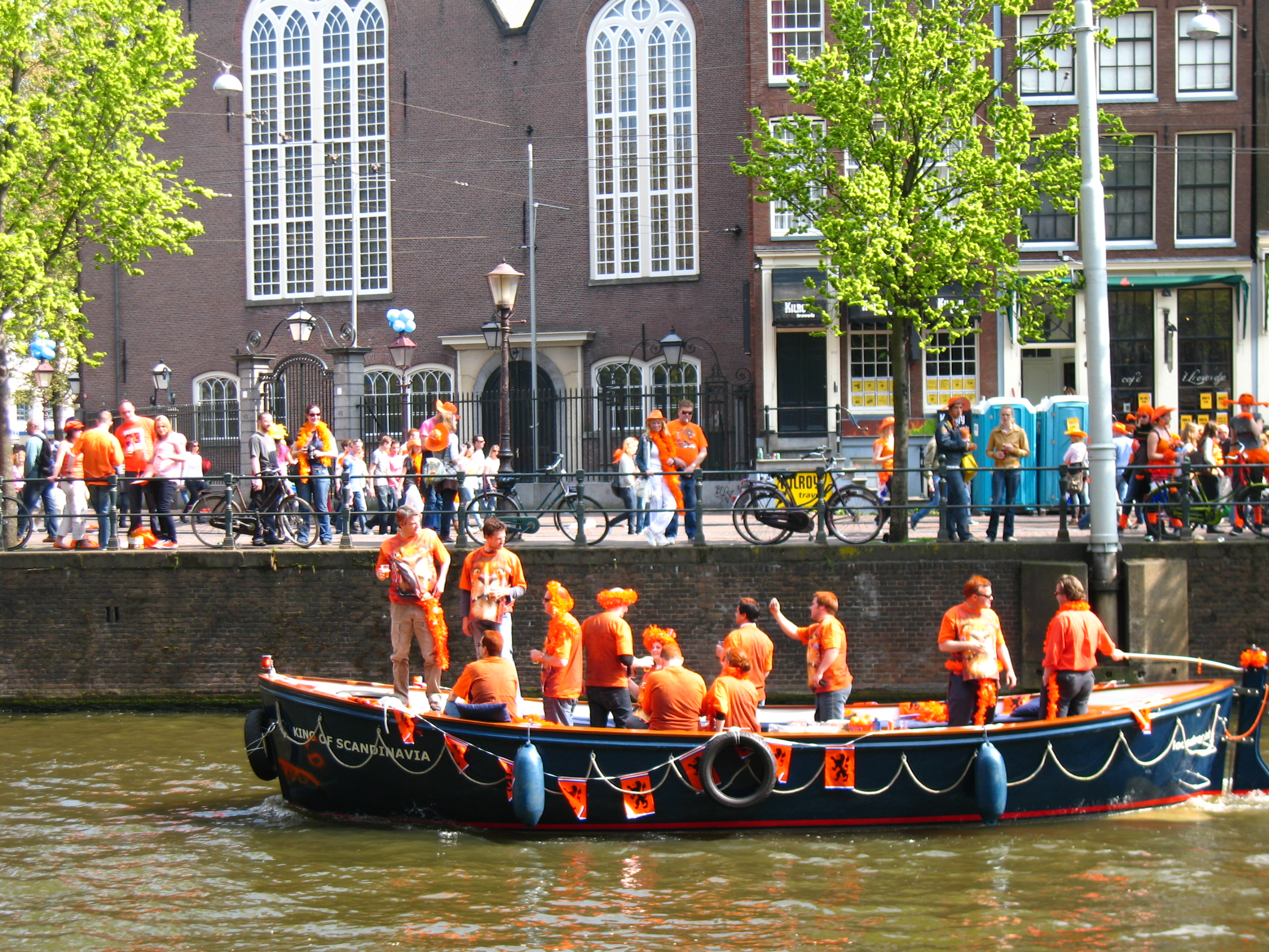 Koninginnedag in Amsterdam 2009